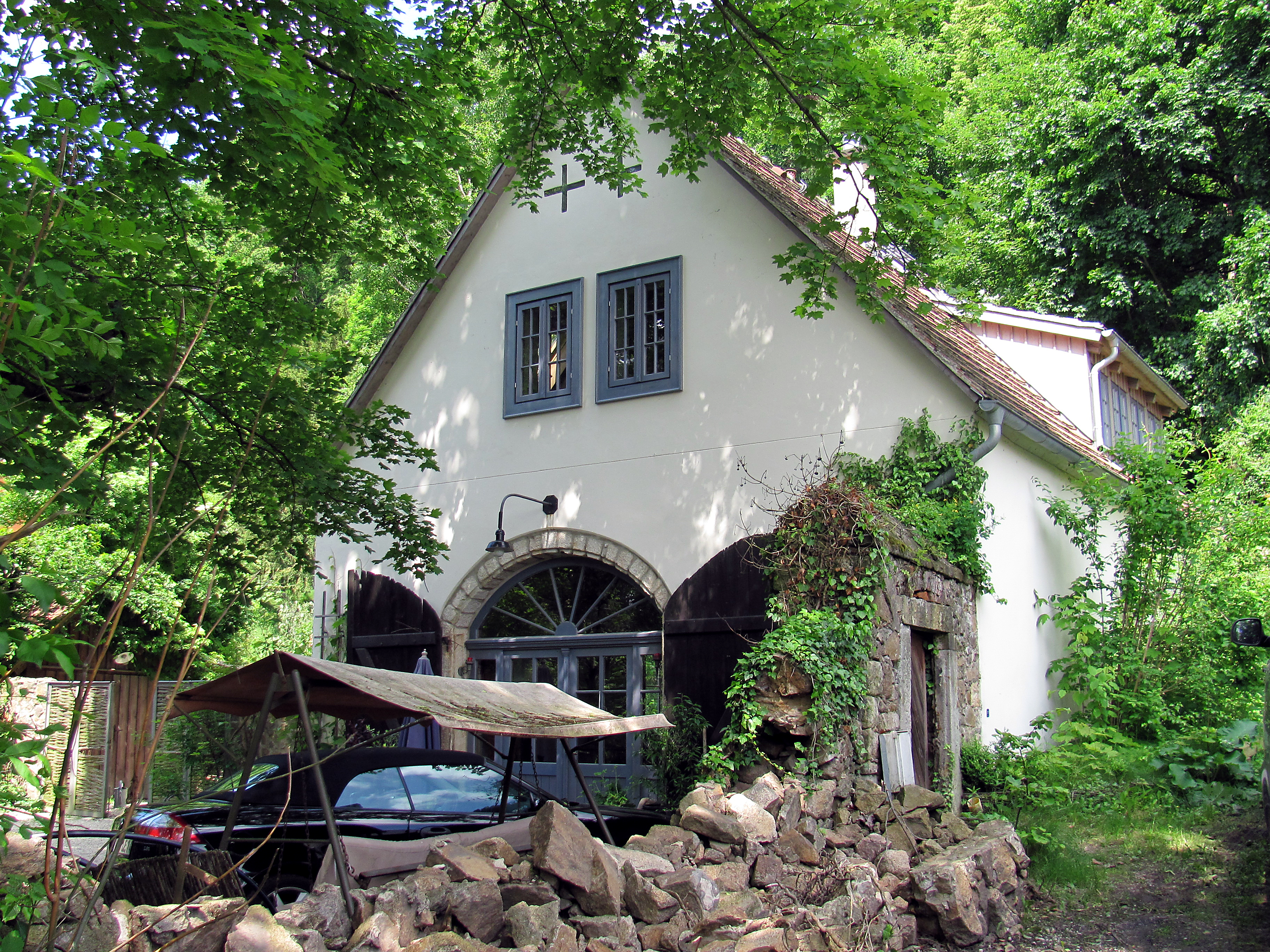 Radebeul-Oberlößnitz, Jägerberg, Remise